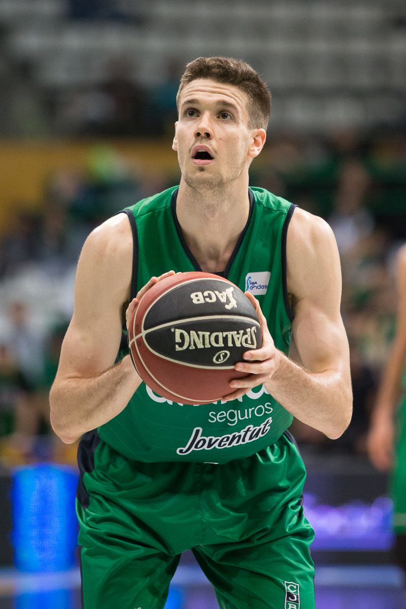 Xabier López-Arostegui en un partido de Liga ACB del Club Joventut Badalona de la temporada 2017-18.